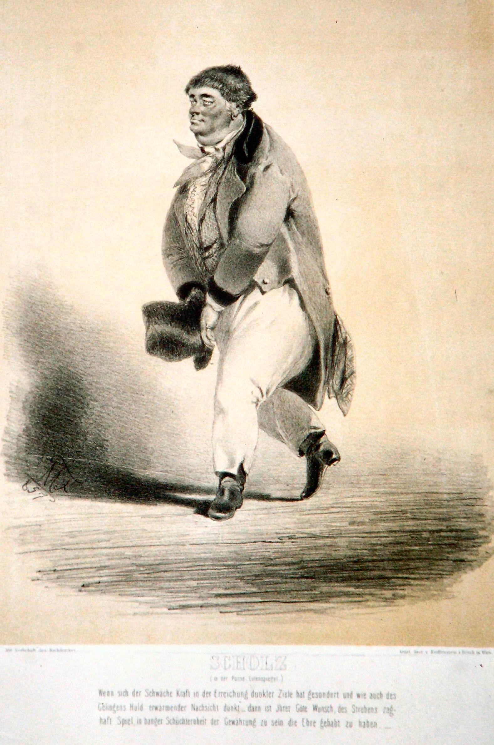 Wenzel Scholz (1787-1857), österreichischer Schauspieler als Eulenspiegel. Lithographie eines unbekannten Künstlers